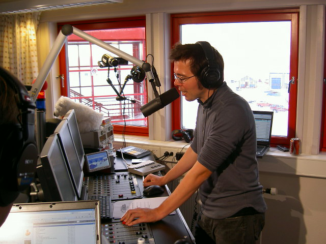 Michiel Veenstra tijdens een van de uitzendingen van Noordpool FM vanaf Spitsbergen. Michiel Veenstra schrijft radiogeschiedenis door als eerste radiomaker ter wereld live een radioprogramma te presenteren vanaf de geografische Noordpool. Dit in het kader van het project Noordpool FM.